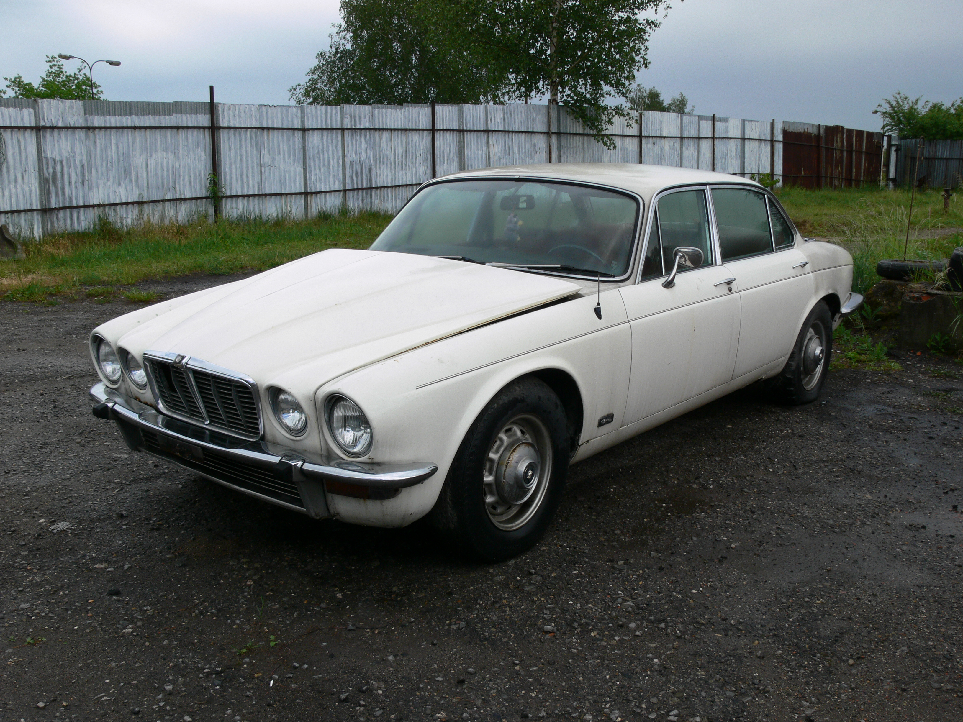 Jaguar XJ 6, testační den amerických automobilů